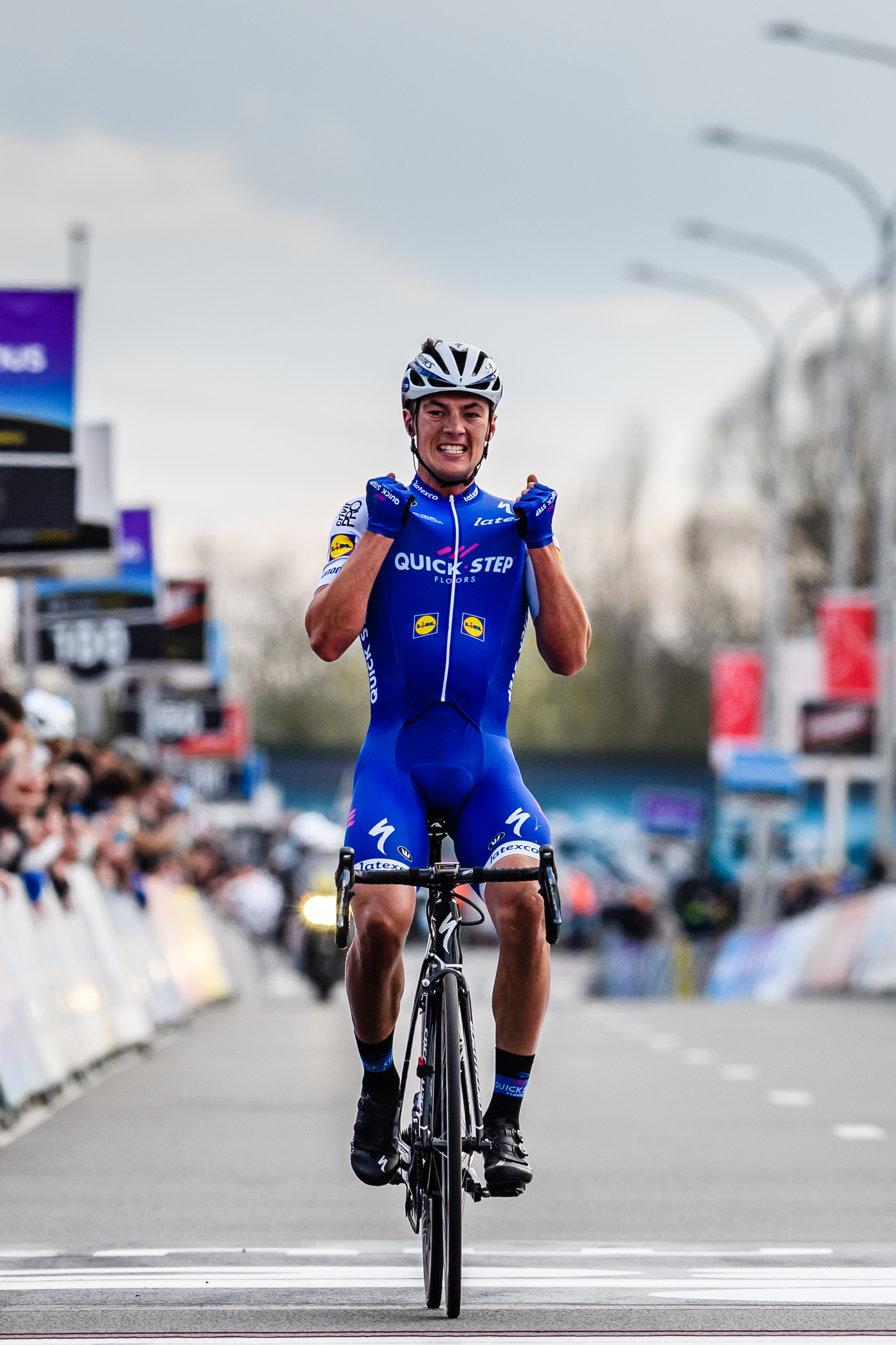 Op zeven kilometer voor de aankomst versnelt Lampaert uit een selecte kopgroep in Dwars door Vlaanderen 2017. De begenadigde tijdrijder houdt stand en komt alleen aan in Waregem.